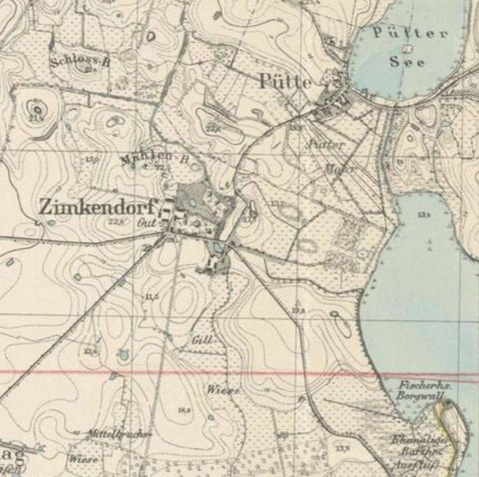 Meßtischblatt 438 : Richtenberg 1931 (Ausschnitt Fischerhaus Borgwall und Schloßberg) Datensatz 71051923 Serie: Topographische Karte (Meßtischblätter); 1743,1931 Beschreibung: Richtenberg. - Hrsg. 1885, bericht. 1925. - 1:25000. - [Berlin]: Reichsamt für Landesaufnahme, 1931. - 1 Kt.